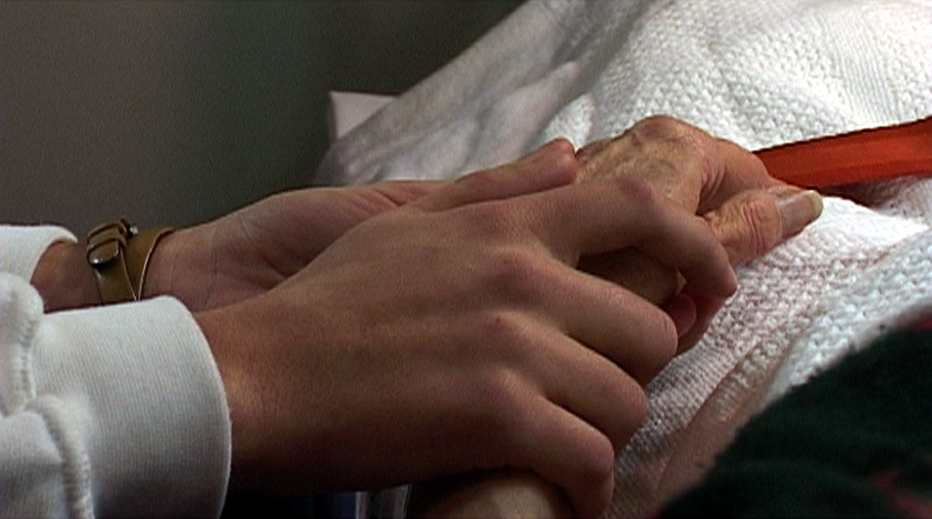 Image tirée de « Collection Premier Jour » de Fernand Melgar.